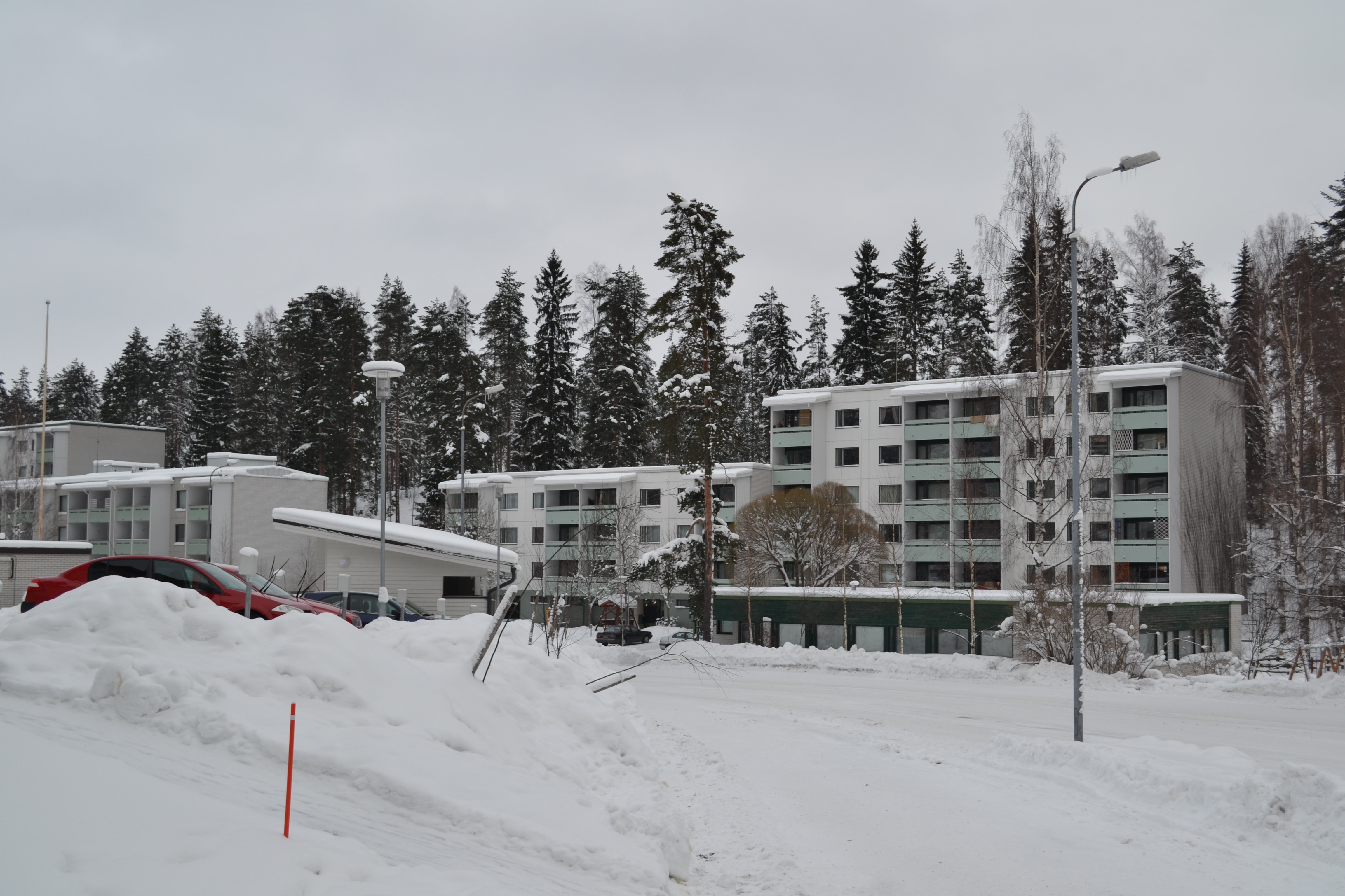 Kypätien kerrostaloja Kypärämäessä